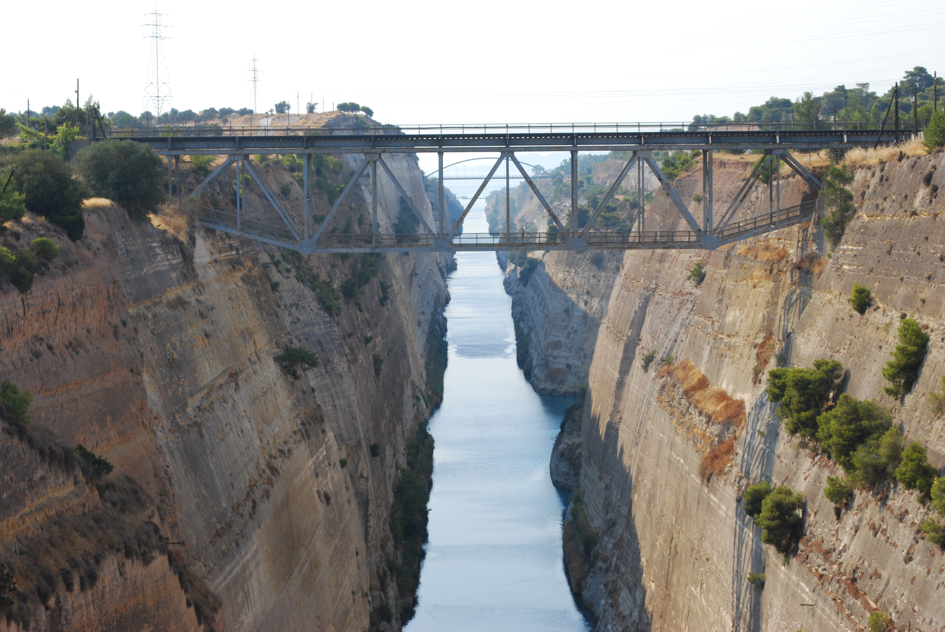 Le canal de Corinthe en Grèce en juillet 2009.